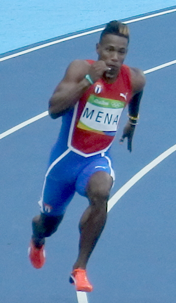 Rio 2016 - Eliminatórias 200m Masculino